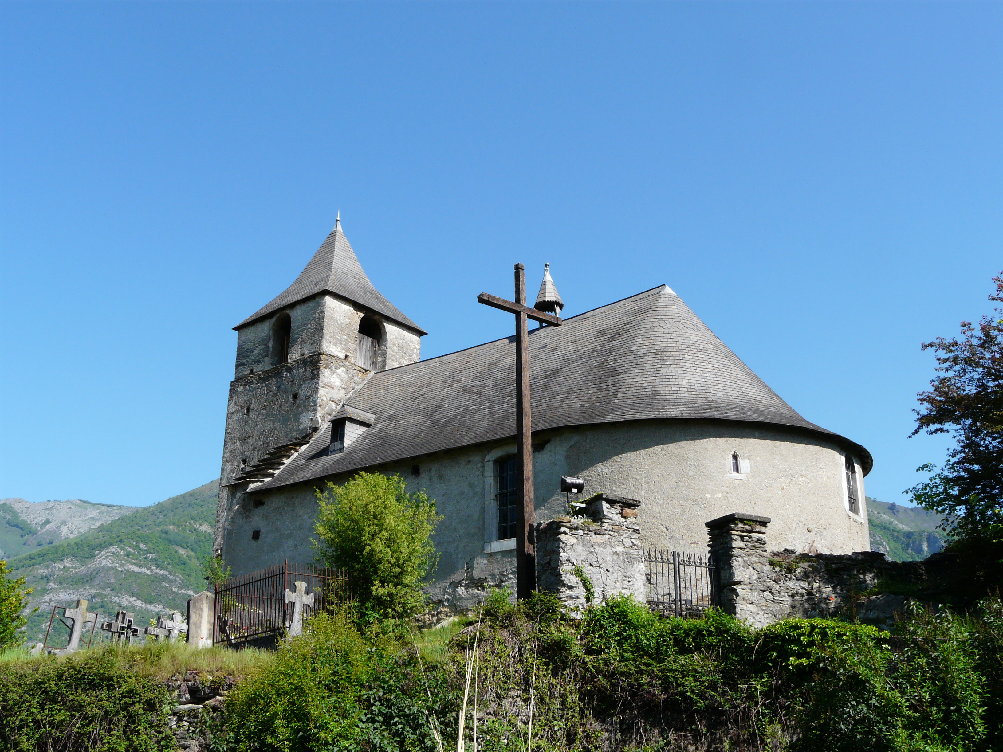 L'église Saint-Barthélémy de Boô vue du sud-est, Boô-Silhen, Hautes-Pyrénées, France.